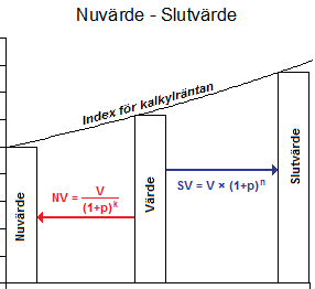 Swedish corporate finance: jämförelse nuvärde-slutvärde